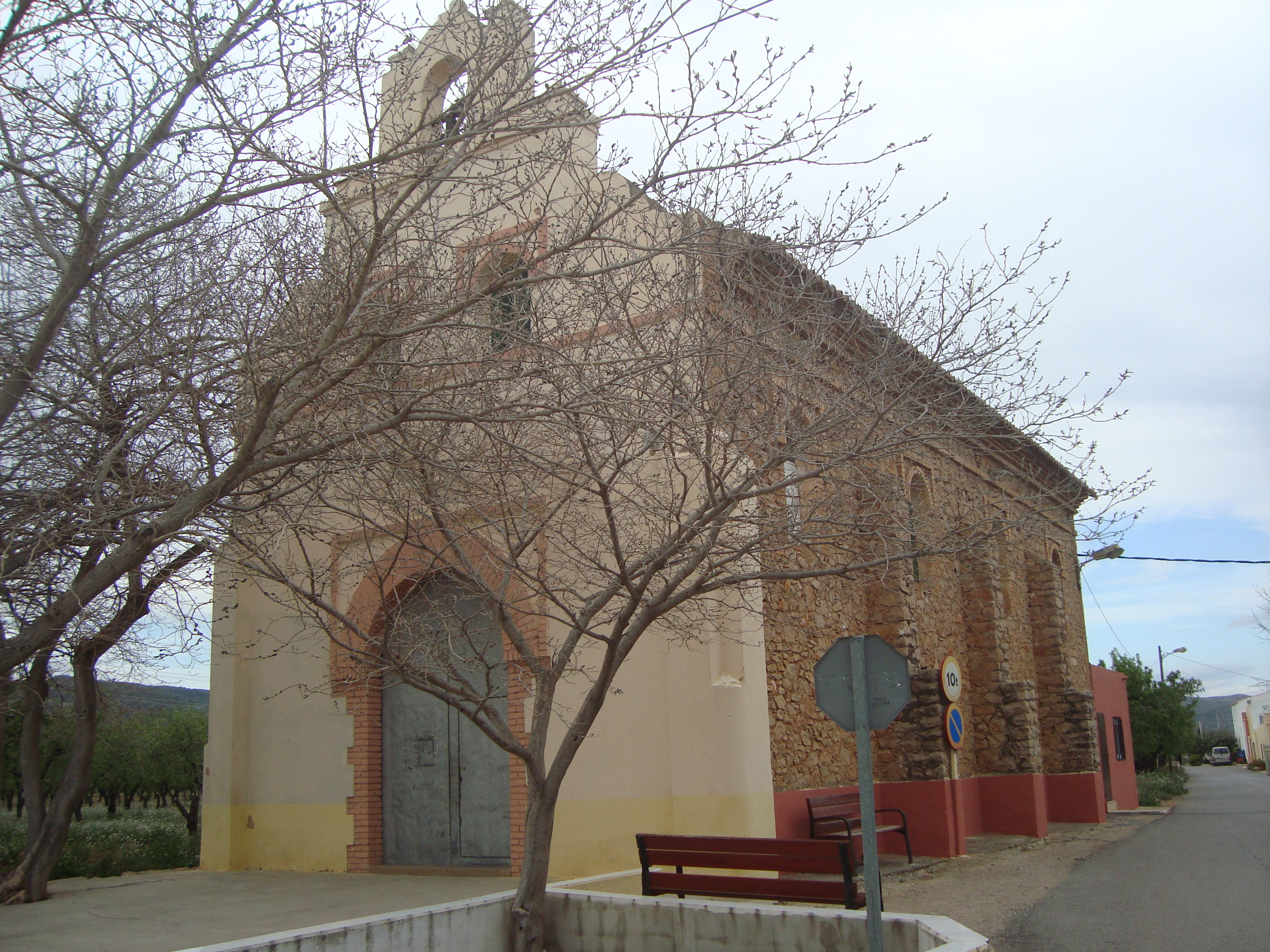 Iglesia parroquial de La Asunción de Nuestra Señora (El Empalme, La Ribera de Cabanes)